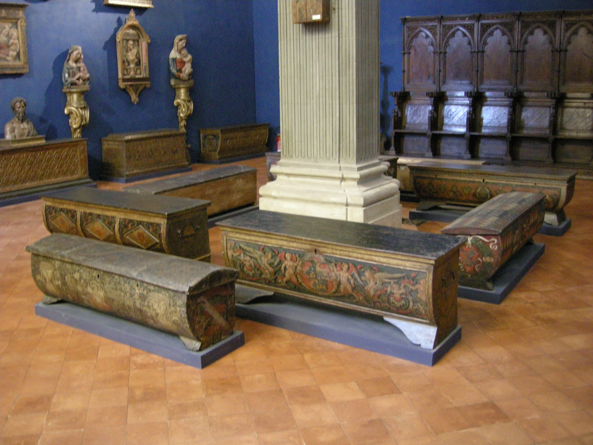 Sala del crocifisso, cassoni dipinti